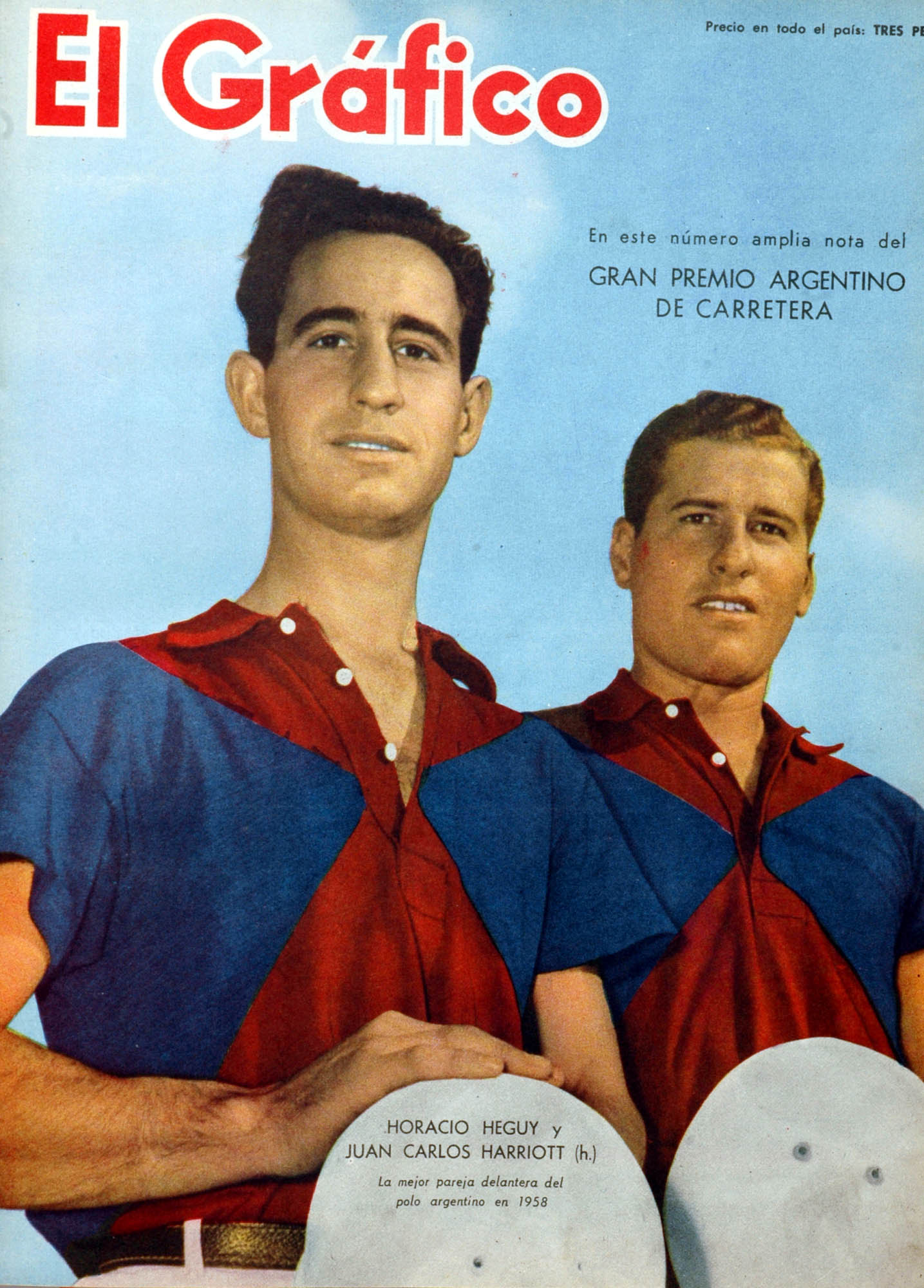 El Grafico del 18 de Diciembre de 1958. Edicion 2049